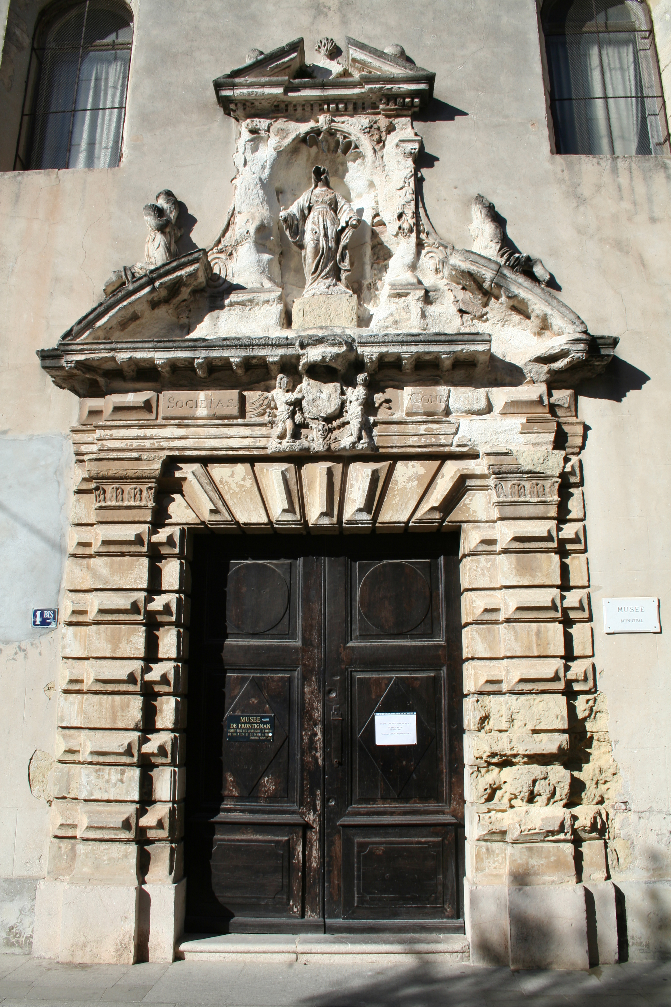 Frontignan (Hérault) - Portail de la Chapelle des Pénitents (aujourd'hui musée municipal) .